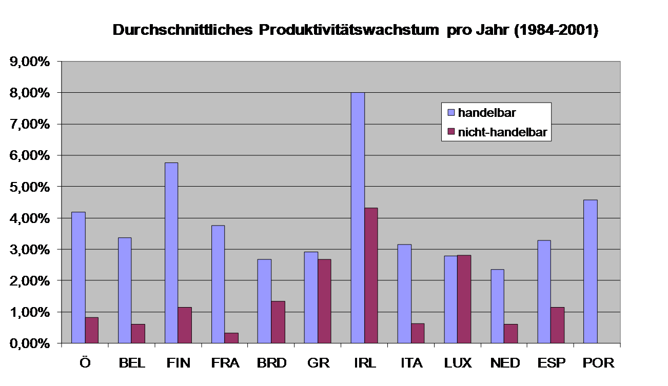 durchschnittliche Produktivitätswachstum